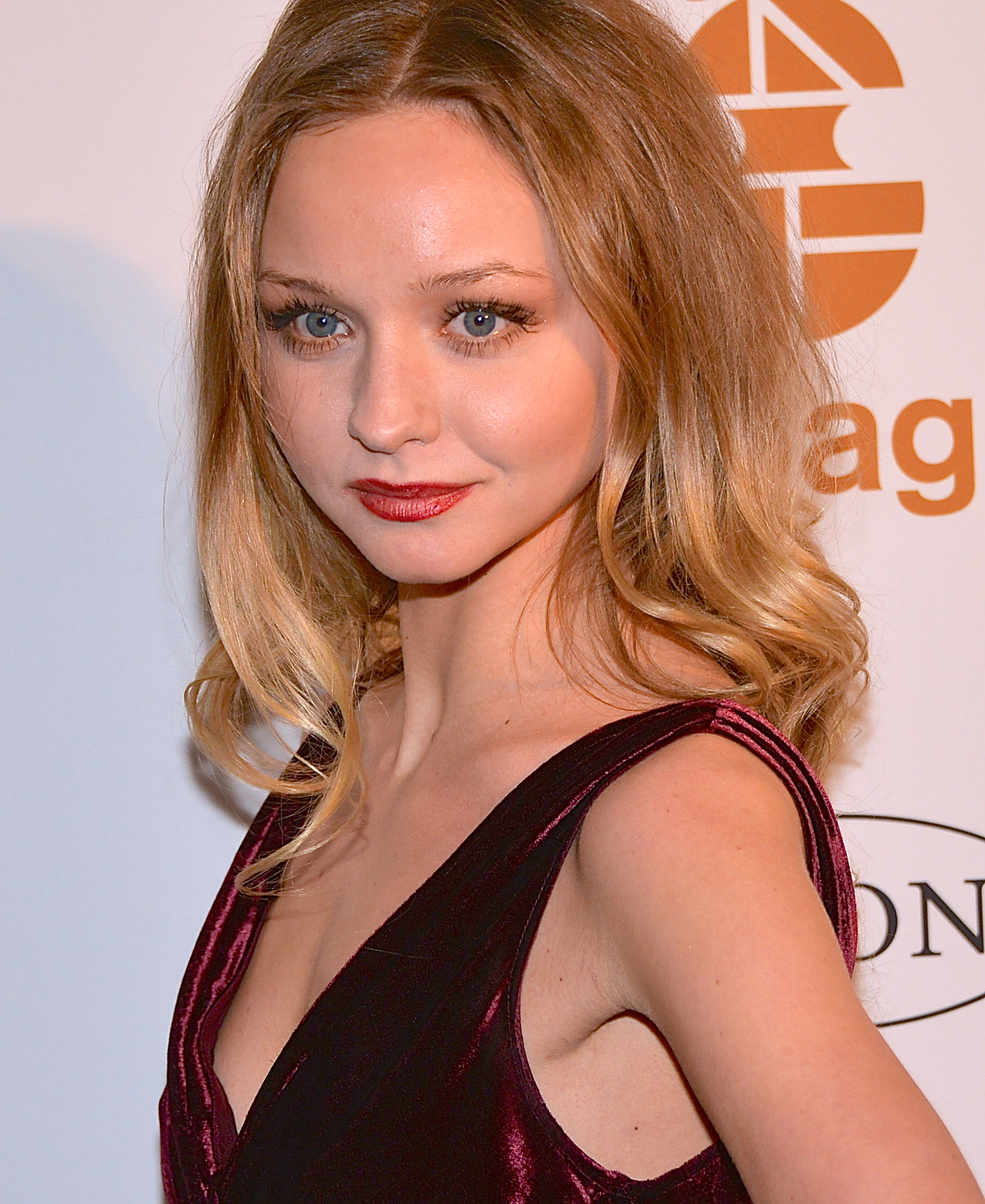 Anna Åström på på Guldbaggegalan 2013 den 21 januari 2013.